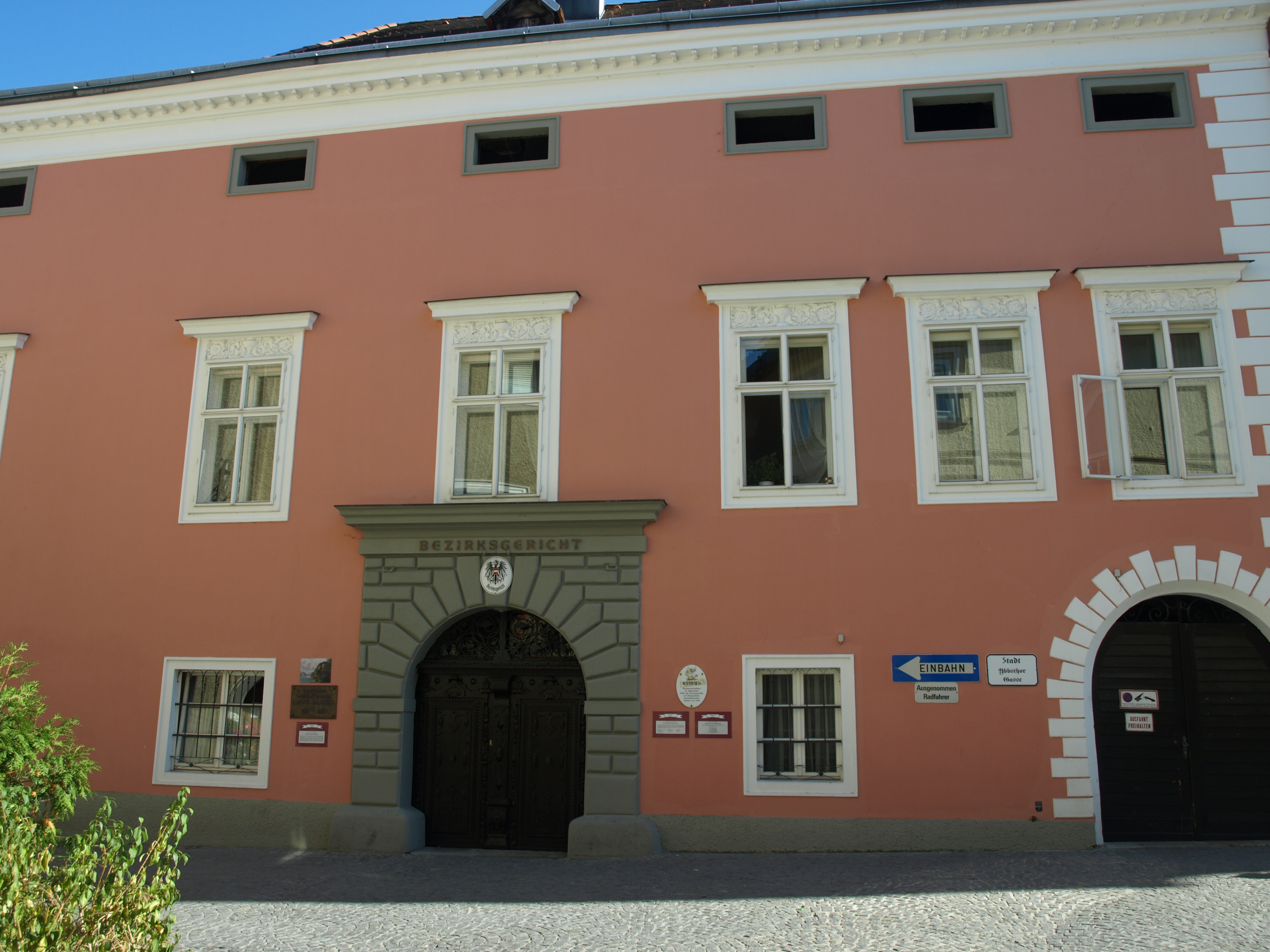 Bezirksgericht